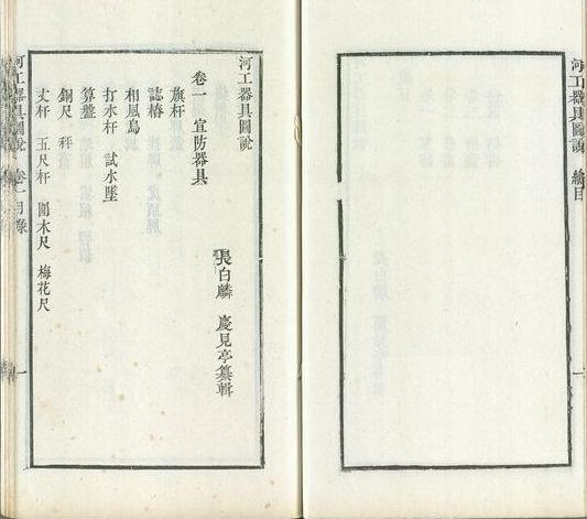 完顏麟慶『河工器具圖說』四卷，清道光十六年雲蔭堂版。